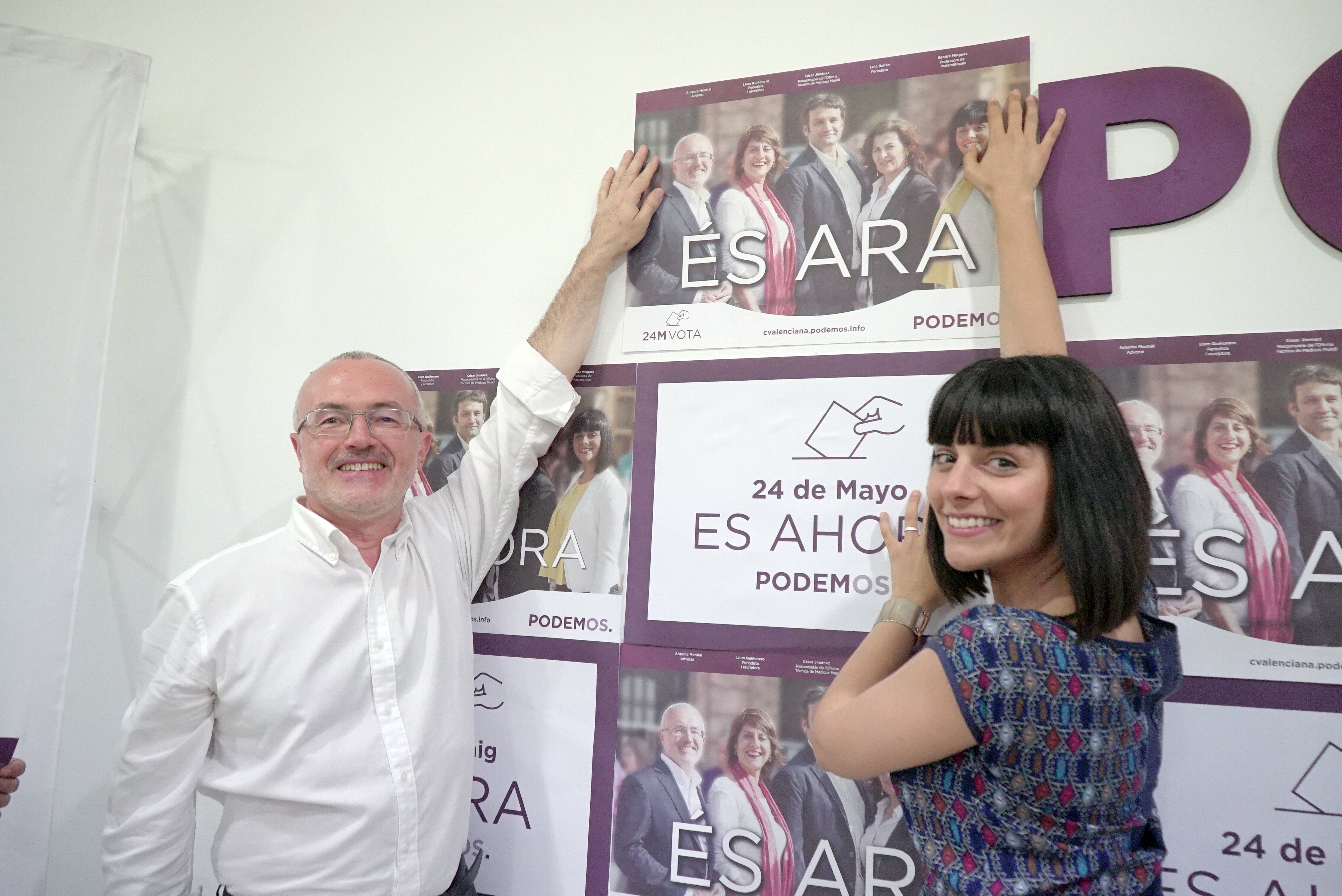 8 Mayo Hora "0" pegada carteles - Valencia